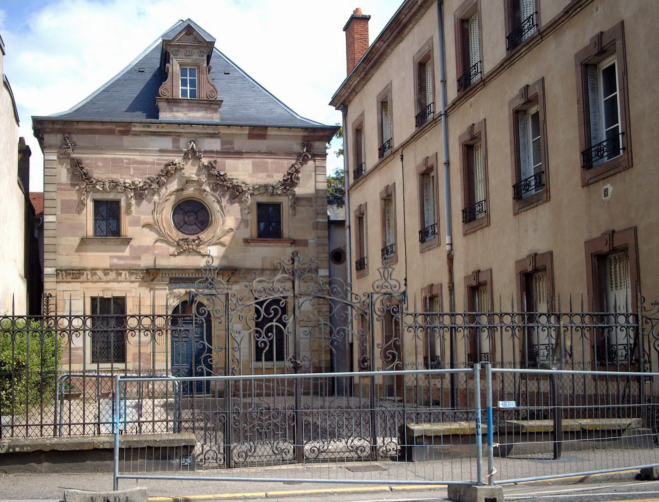 Synagogue de Lunéville à l'est de la France (Meurthe et Moselle),construite en 1786, suite à l'autorisation accordée par Louis XVI, Roi de France, à condition qu'elle ne soit pas visible de la rue. A l'époque, elle fut la 1re construite depuis le Moyen-Age. et reste l'une des plus ancienne subsistant à ce jour It is indexed in the Base Mérimée, a database of architectural heritage maintained by the French Ministry of Culture, under the references PA00106084 and IA00121600 .